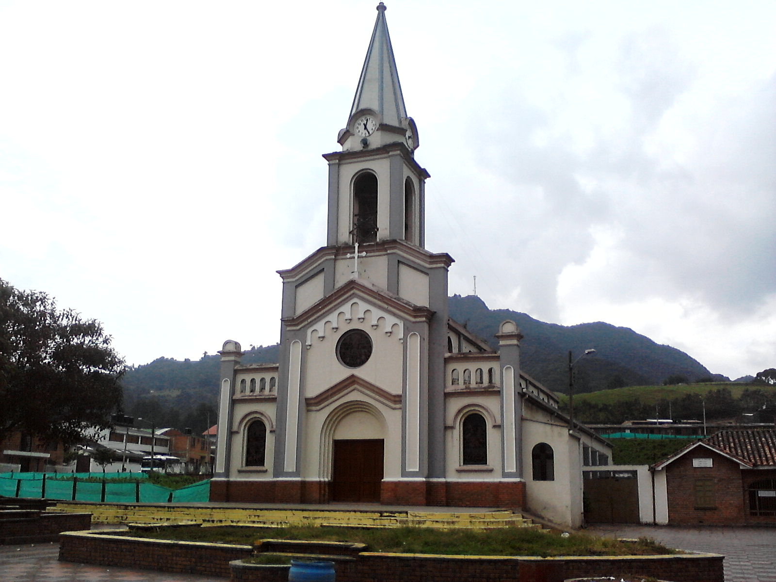 Iglesia de Tausa, Cundinamarca.